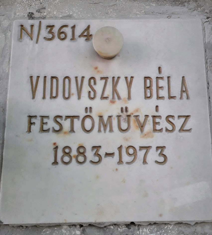 Az urnasír a Farkasréti temetőben a Németvölgyi úti urnafalban található, közel a MAgyar Honvédség halottainak nyughelyéhez. Az urnasír száma N/3614, az urnafal jobb oldalán, felülről a második sor szélen. Az urnasír fedlapja tisztított ,a márványlapba a vésett betűk újraaranyozottak, patinásak.